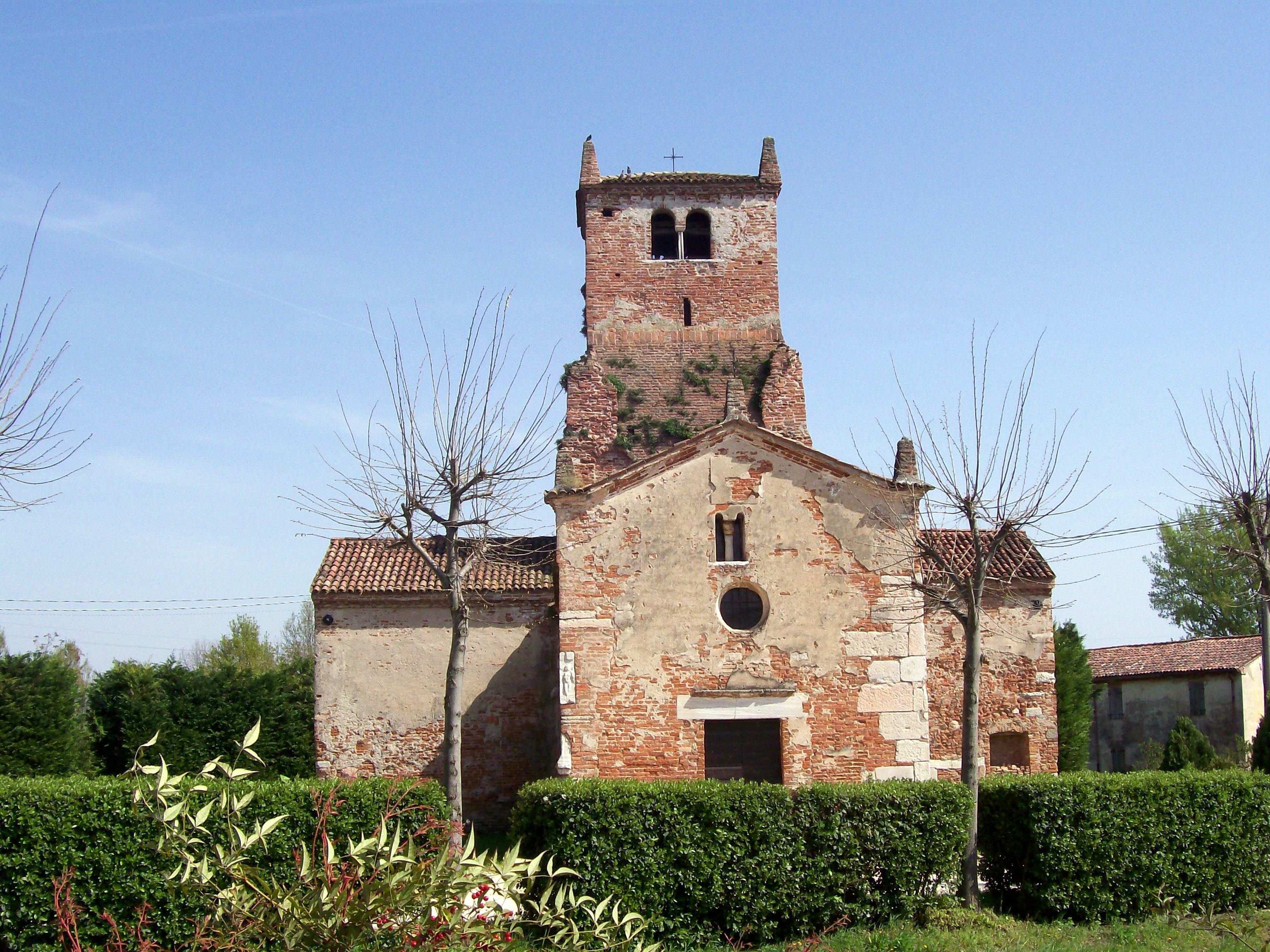 Chiesa di S. Pietro in Monastero, detta "il Cesòn", presso San Pietro in Valle (VR).